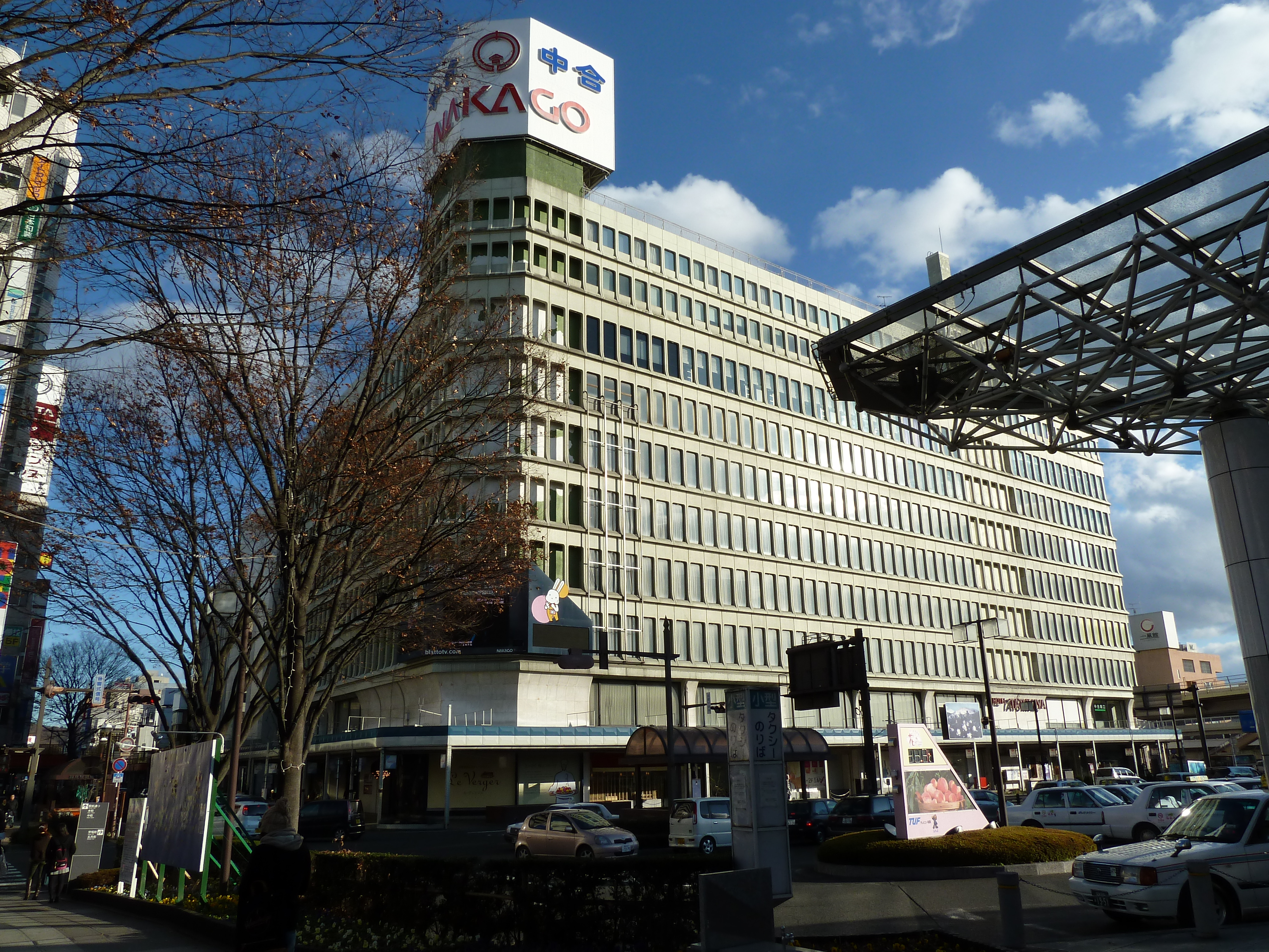 福島駅前にある中合